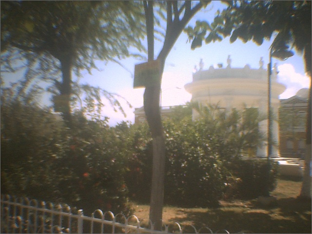 En esta fotografía se puede ver en el fondo el legendario templete de la ciudad de Ciénaga